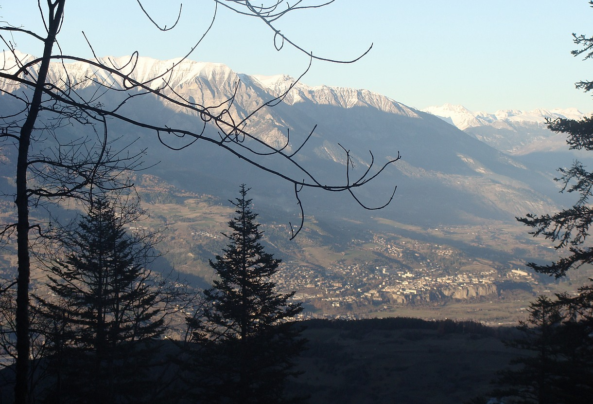 La ville d'Embrun (Hautes-Alpes) et la bordure sud-est du massif des Ecrins, vues depuis la forêt de Boscodon.